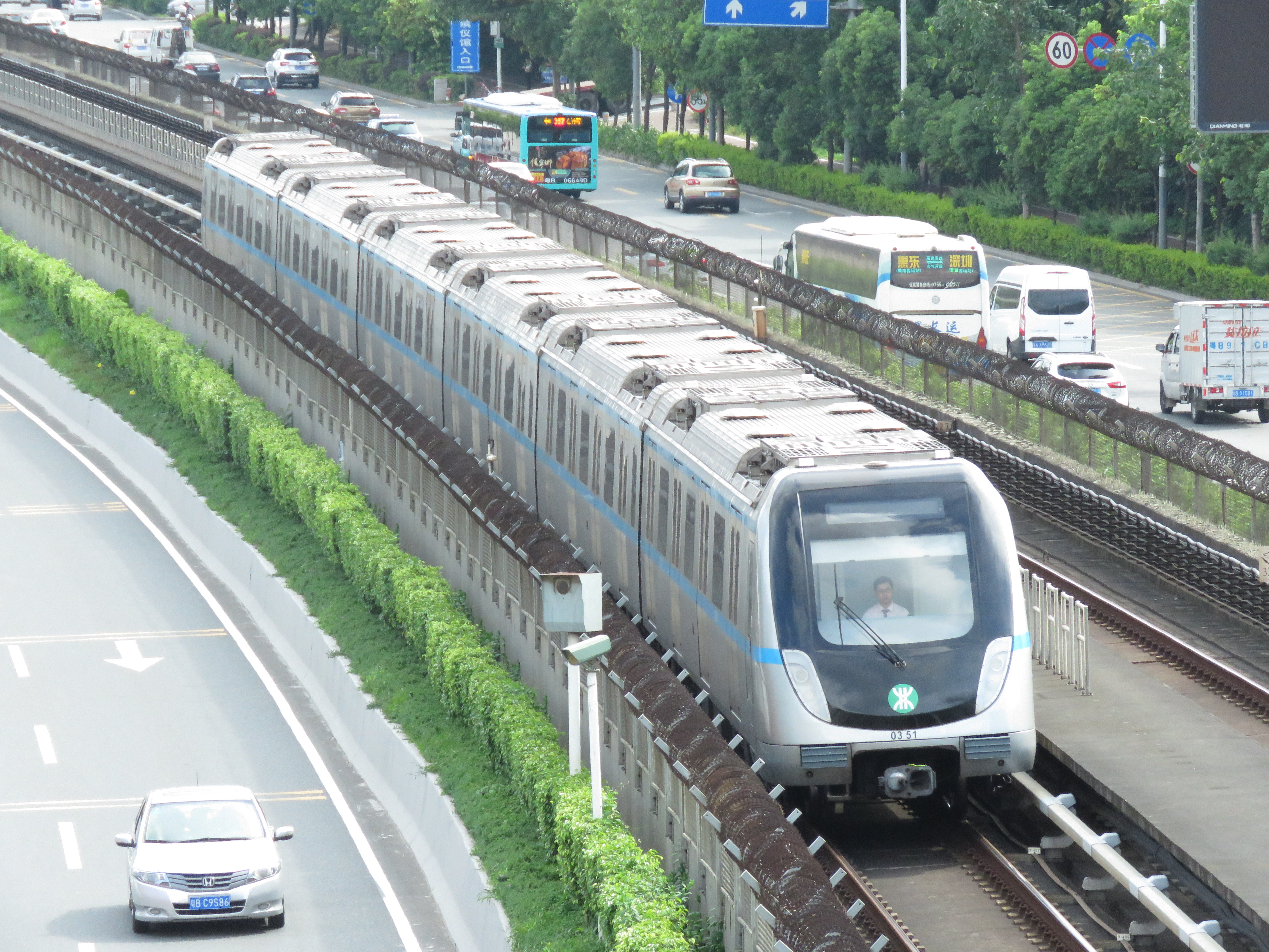 深圳地铁3号线南车浦镇B型列车